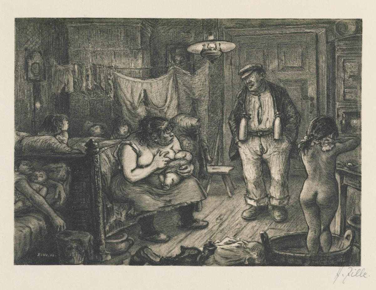 Heinrich Zille Blatt mit dem Titel "Der späte Schlafbursche" aus der Grafischen Sammlung der Stiftung Stadtmuseum Berlin